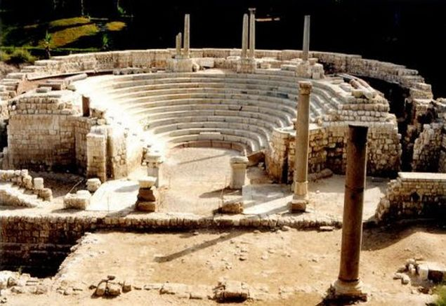 Римський амфітеатр в Александрії